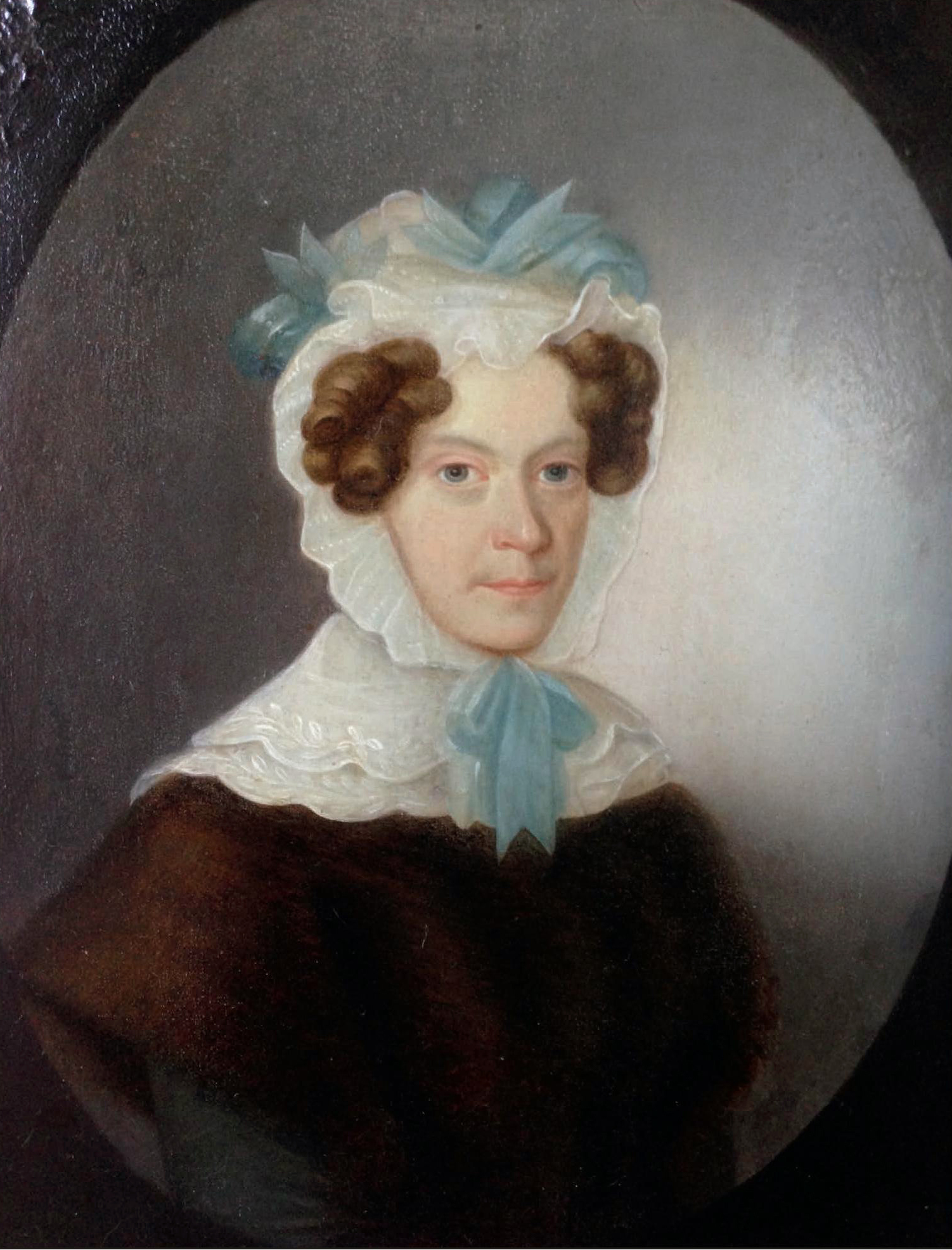 Портрет Маргариты Ммихайловны Тучковой